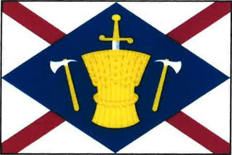 Němčice, okres Mladá Boleslav, vlajka